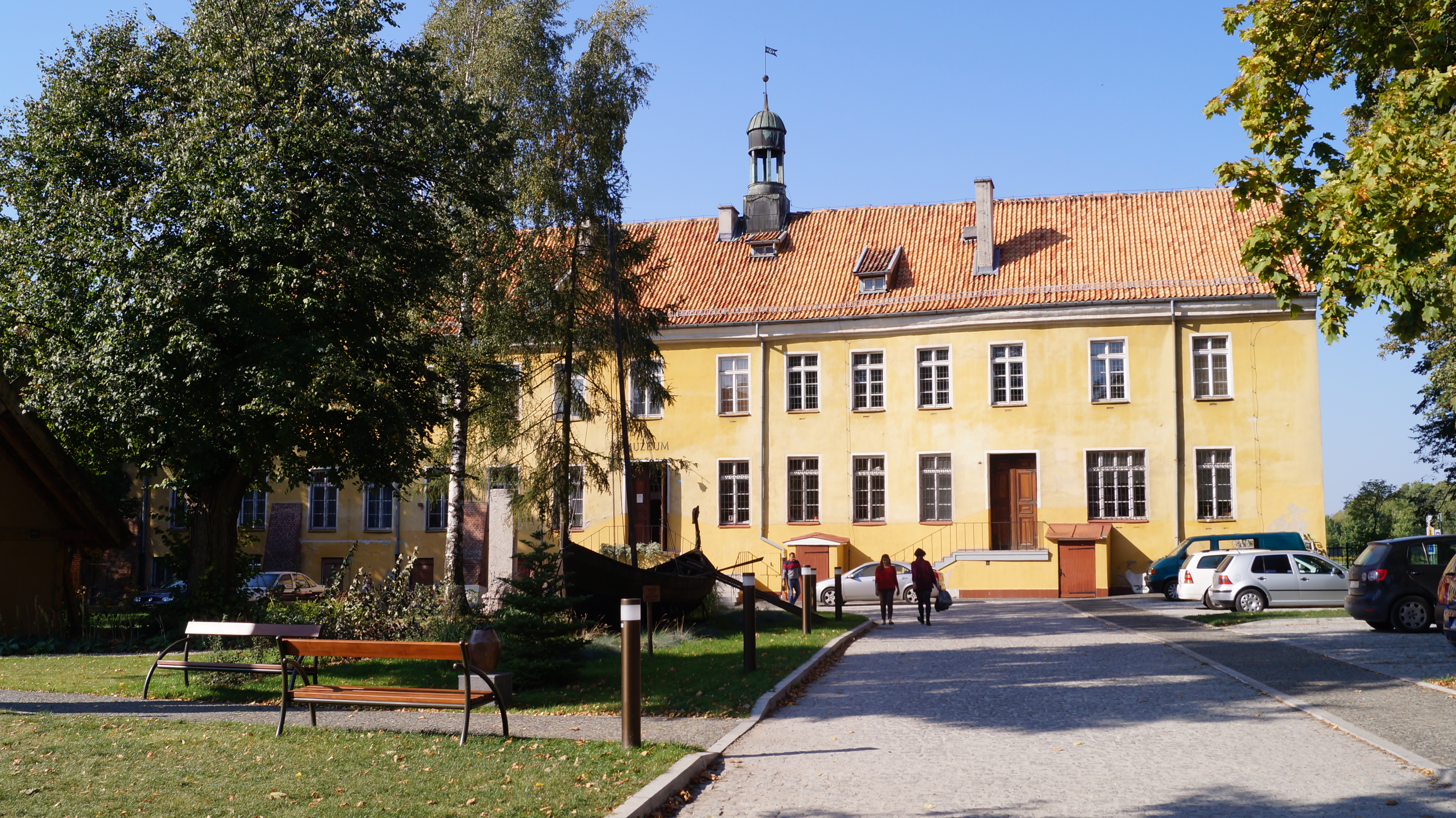 Elbląg, gimnazjum elbląskie (d. spichrz krzyżacki), XIII-XIV, XVI, XIX